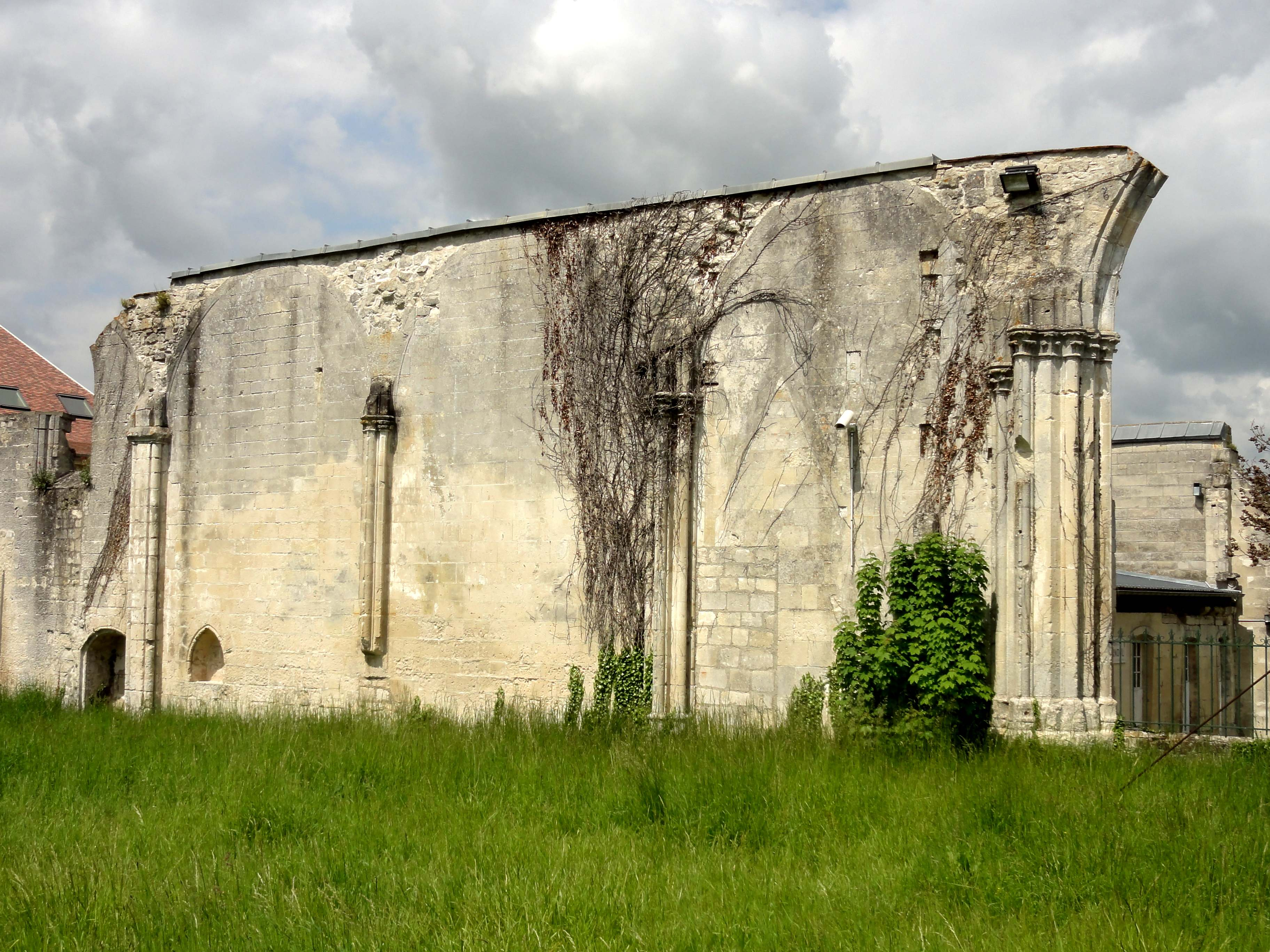 Prieuré Saint-Arnoul de Crépy-en-Valois - voir titre.